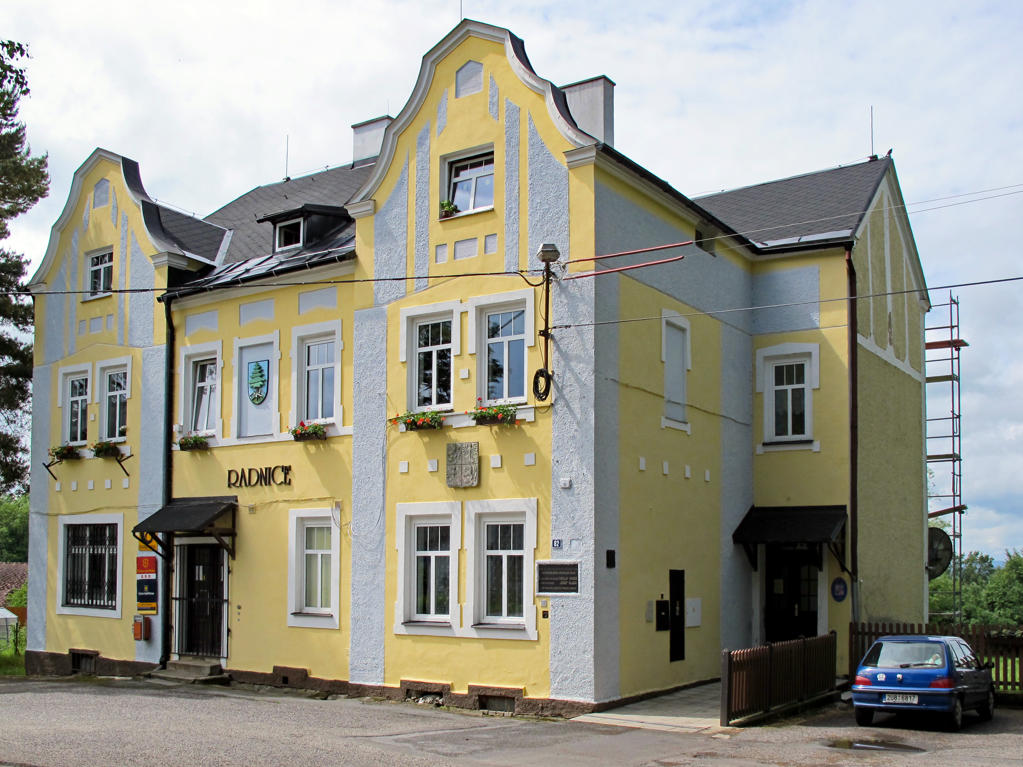 Tři Sekery, okres Cheb - obecní úřad. This image was acquired during the event Wikiměsto Mariánské Lázně.